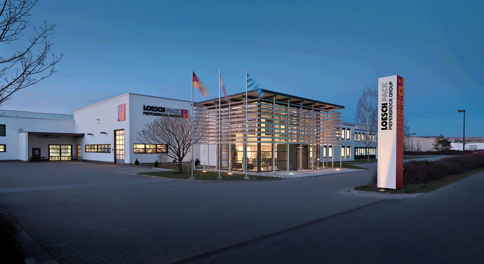 Firmensitz der Loesch Verpackungstechnik GmbH (LoeschPack) in Altendorf